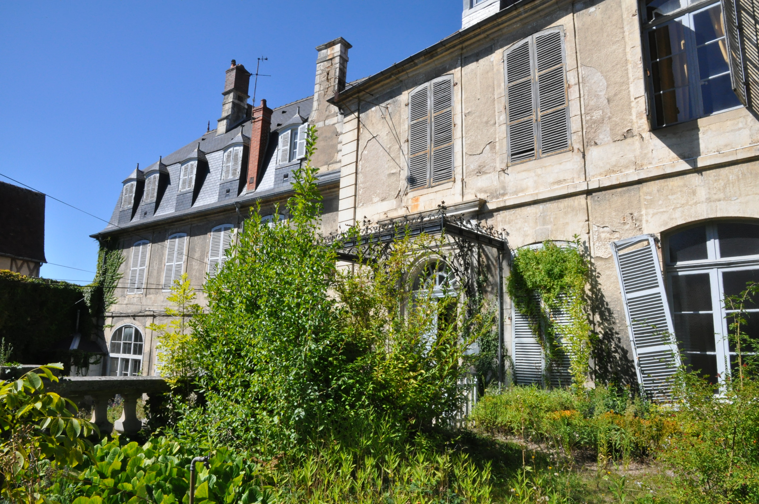 jardin